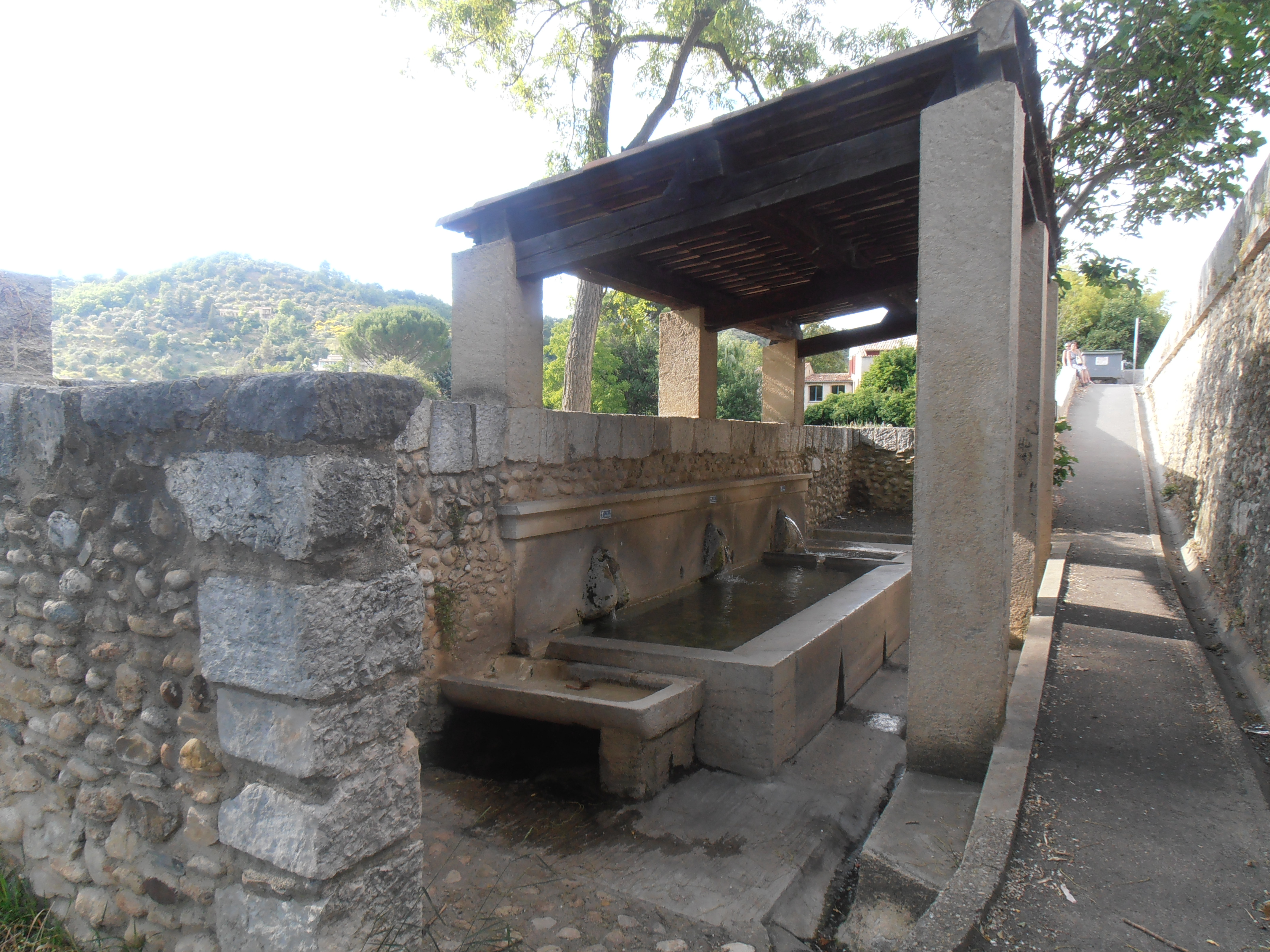 Alpes-de-Haute-Provence, Riez, Fontaine sur le passage d'accès au site des 4 colonnes antiques